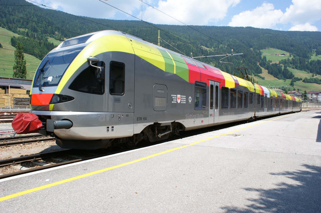 SAD ETR 155-003 im Bahnhof Innichen